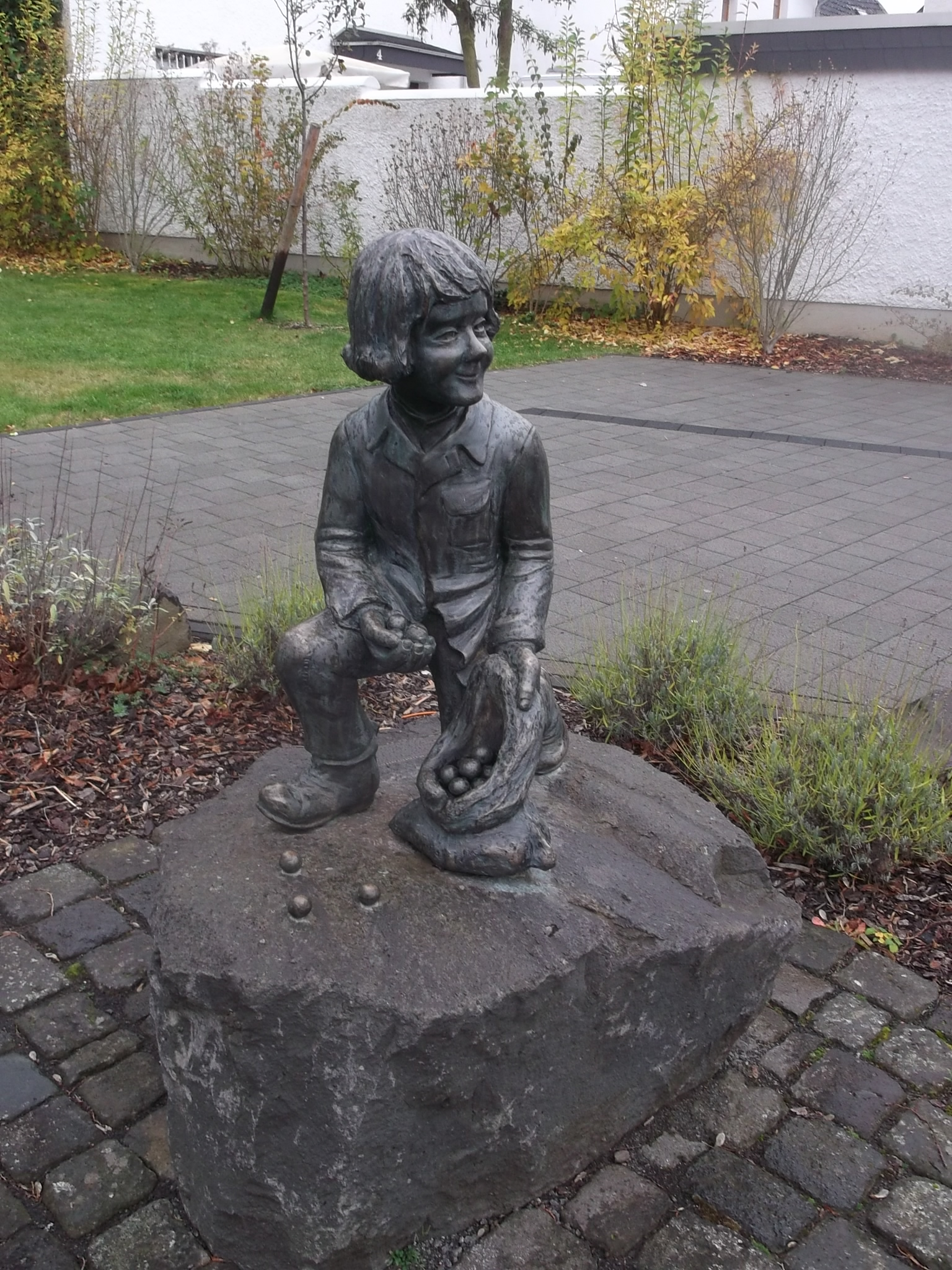 Auf die preußische Zeit geht die Symbolfigur des Layer Kuoleroffer (= Kugelraffer) zurück. Arme Bewohner wanderten über den Ankerpfad auf die Karthäuser Schießstände, um verschossene Kugeln zu sammeln und das Material weiterzuverkaufen.